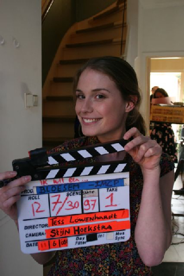 Anne-Loek Beernink (Aalten, 6 maart 1986) is een Nederlandse actrice en zangeres.